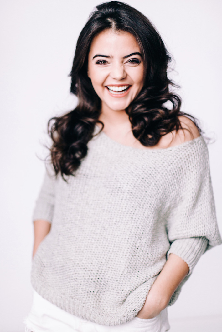 Kasia Ucherska 02 fot. Norma Ilnicka